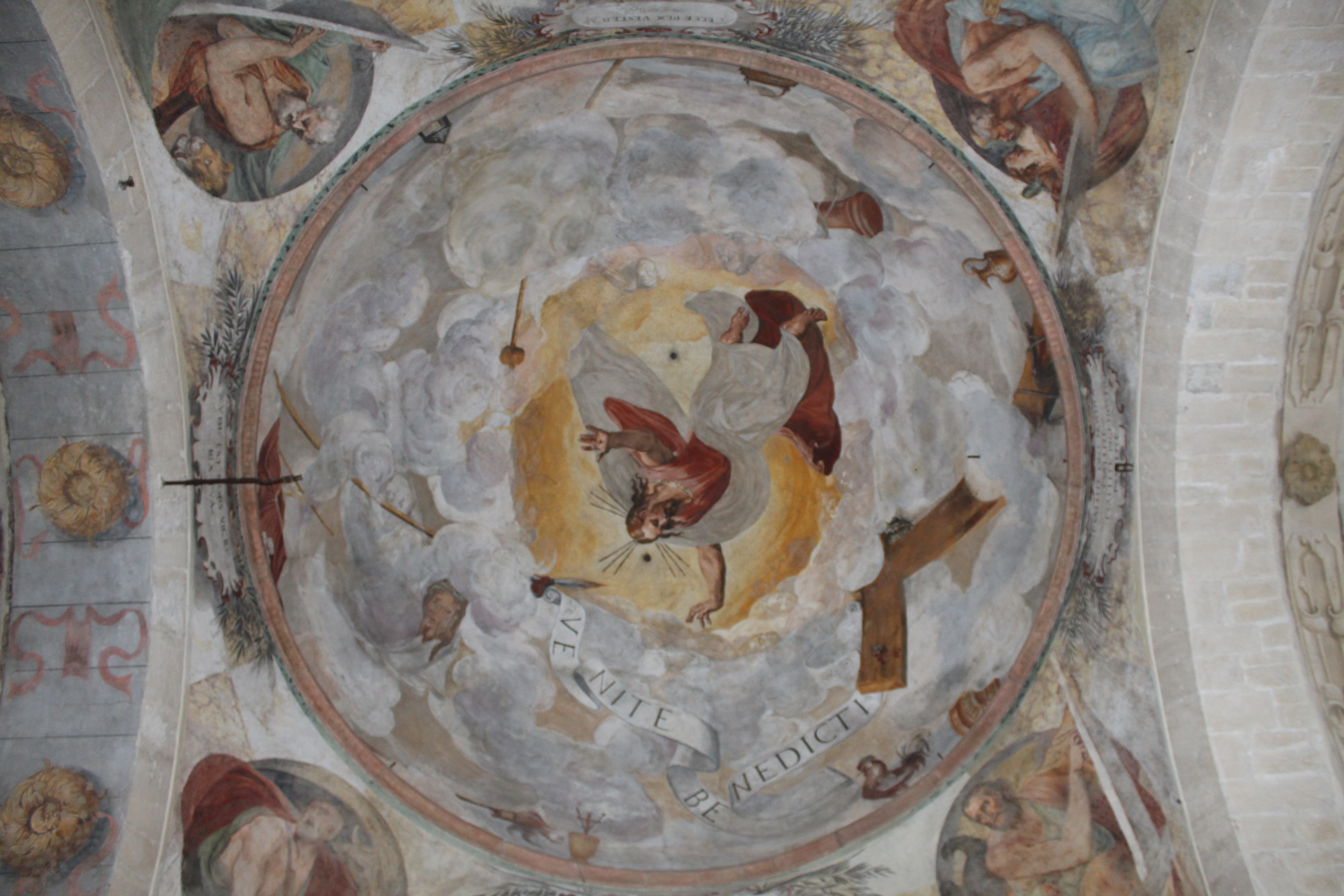 Interno della chiesa di Santo Stefano a Verona